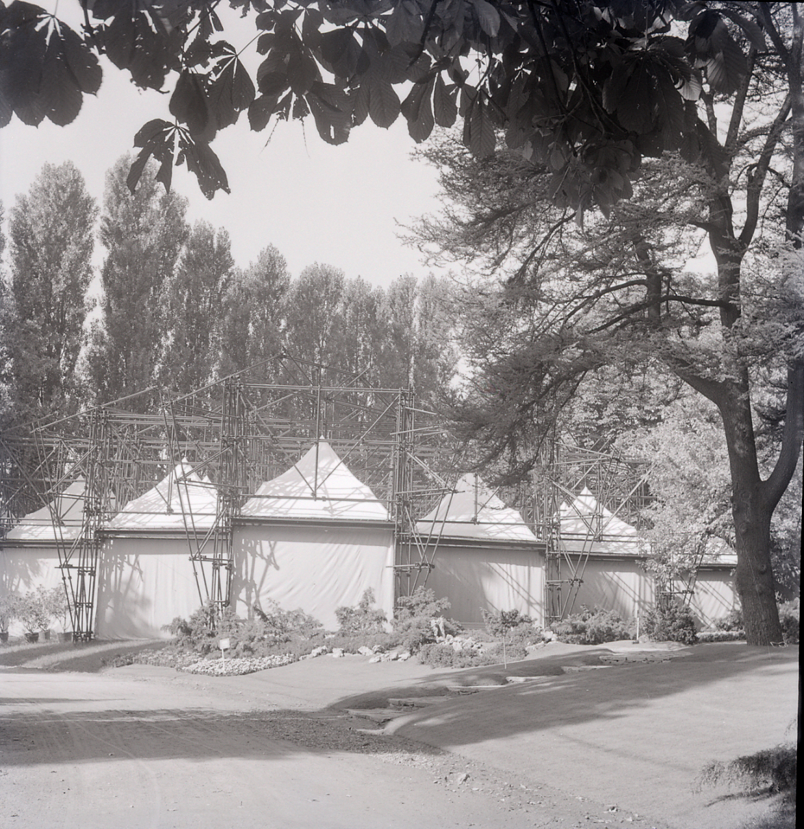 Servizio fotografico : Milano, 1954 / Paolo Monti. - Buste: 2, Fototipi: 2 : Negativo b/n, gelatina bromuro d'argento/ pellicola ; 6x6. - ((Serie costituita da 2 negativi identificati con i nn.: 23758-23759. Numerazione parallela: 1319-1321. La suddetta serie è contenuta nella scatola identificata con la numerazione 23214/23808. Sulla scatola manoscritto con pennarello nero: "Design e arte moderna". - Occasione: Documentazione della X Triennale del 1954, intitolata "Prefabbricazione - Industrial Design: Esposizione Internazionale delle Arti Decorative e Industriali Moderne e dell'Architettura Moderna". L'esposizione si tenne presso il Palazzo dell'Arte. - Fonte: Fattura di Paolo Monti: IV . Commesse/ Fattura n. 32/ Fotografie d'archivio per volume sulla Triennale di Milano (1977/11/28), presso Archivio Paolo Monti. n. 15 fotografie decime Triennale di Milano 1954